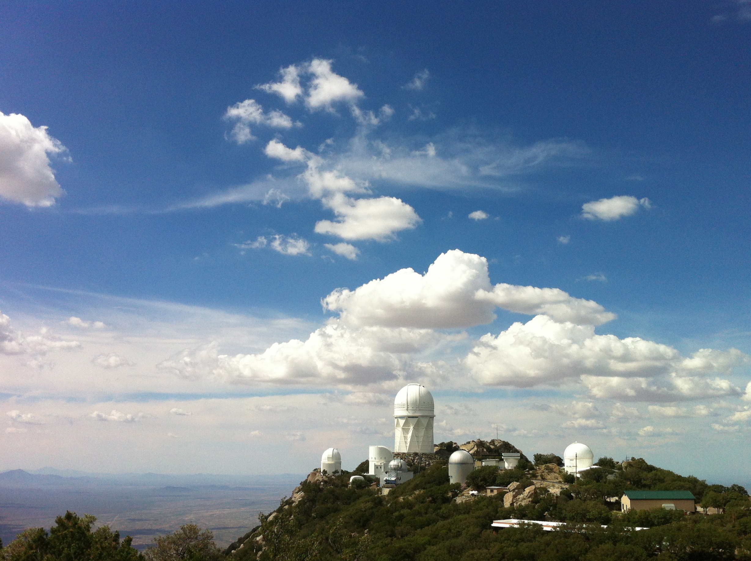 Kitt Peak